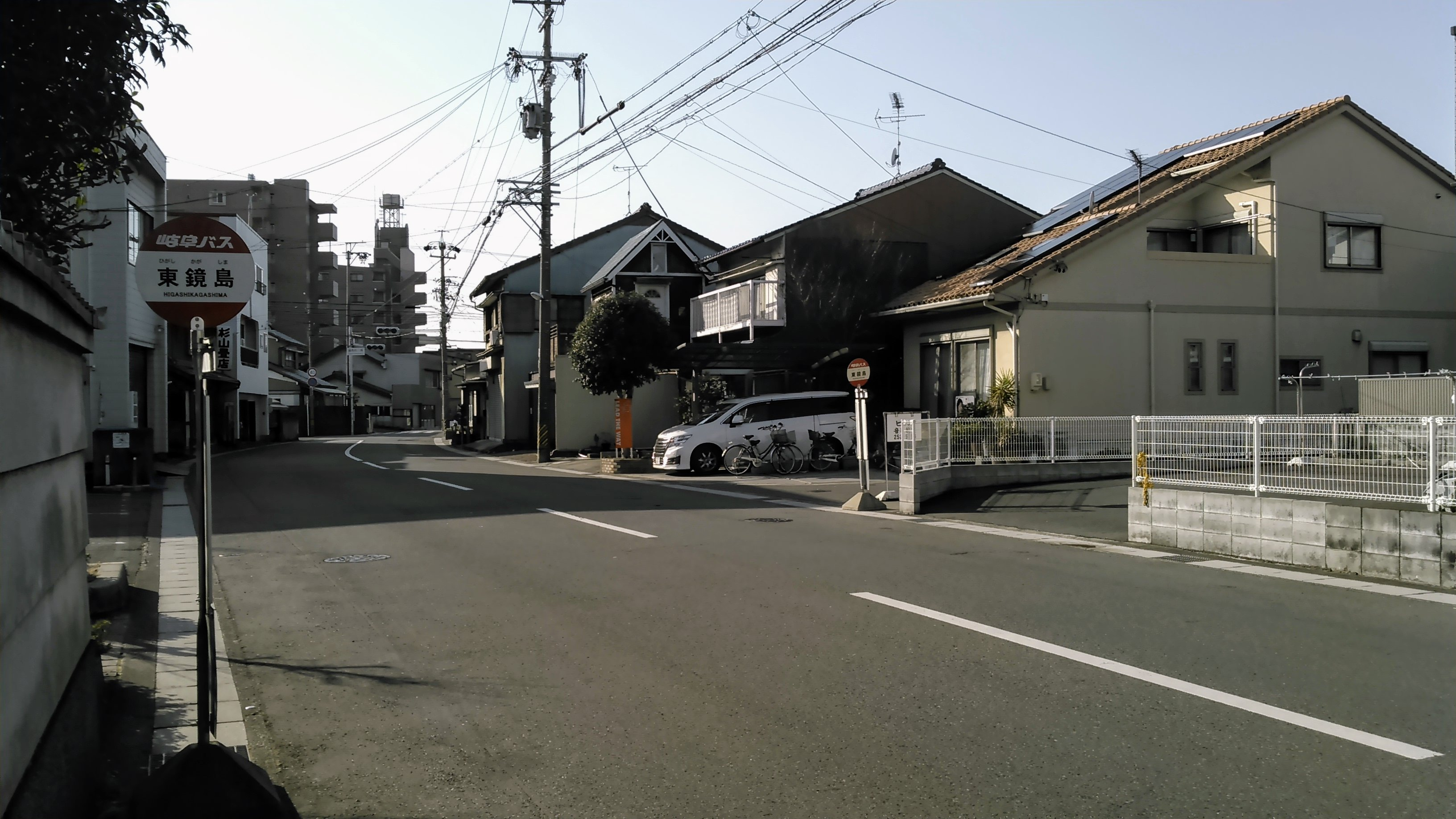 岐阜バス（かつては名鉄バス運用時代もあり）の停留所。 1964年以降は名鉄鏡島線・東鏡島駅の代替のバス停留所としても機能もある。